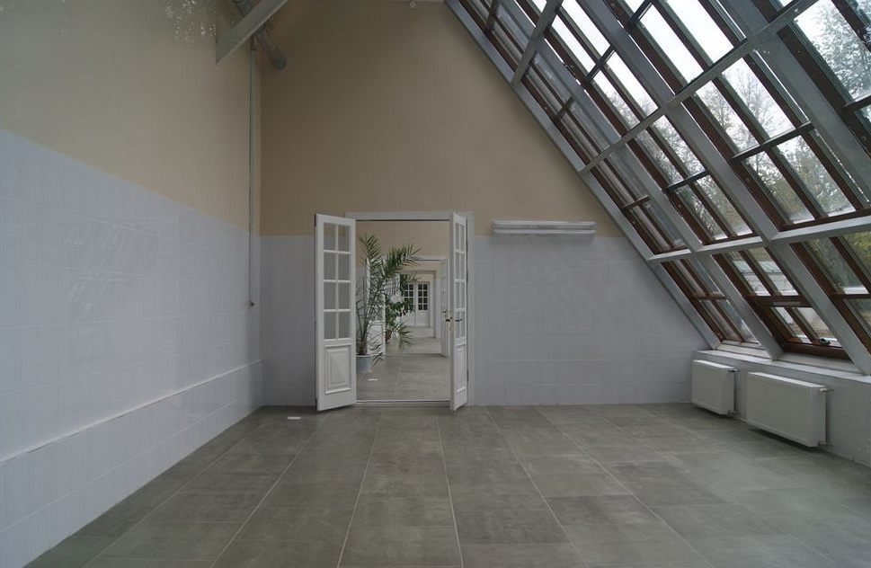 Сядзіба Агінскіх у Залессі пасля рэстаўрацыі